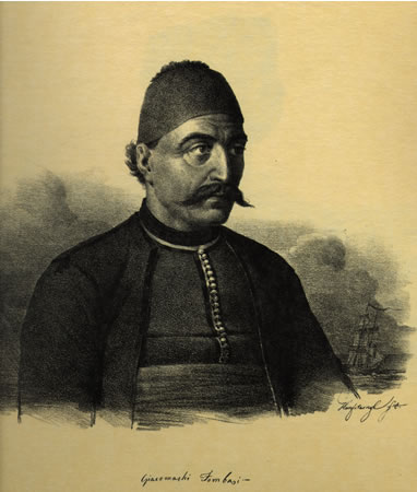 Aπό: Bildnisse ausgezeichneter Griechen und Philhellenen nebst einigen Ansichten und Trachten. Nach der Natur gezeichnet und herausgegeben von Karl Krazeisen. Munchen 1831